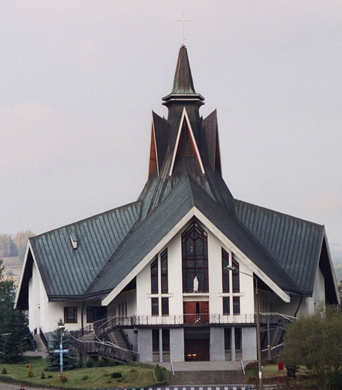 Kamesznica - kościół p.w. Najświętszego Imienia Maryi Author: Przykuta Date: October 2005